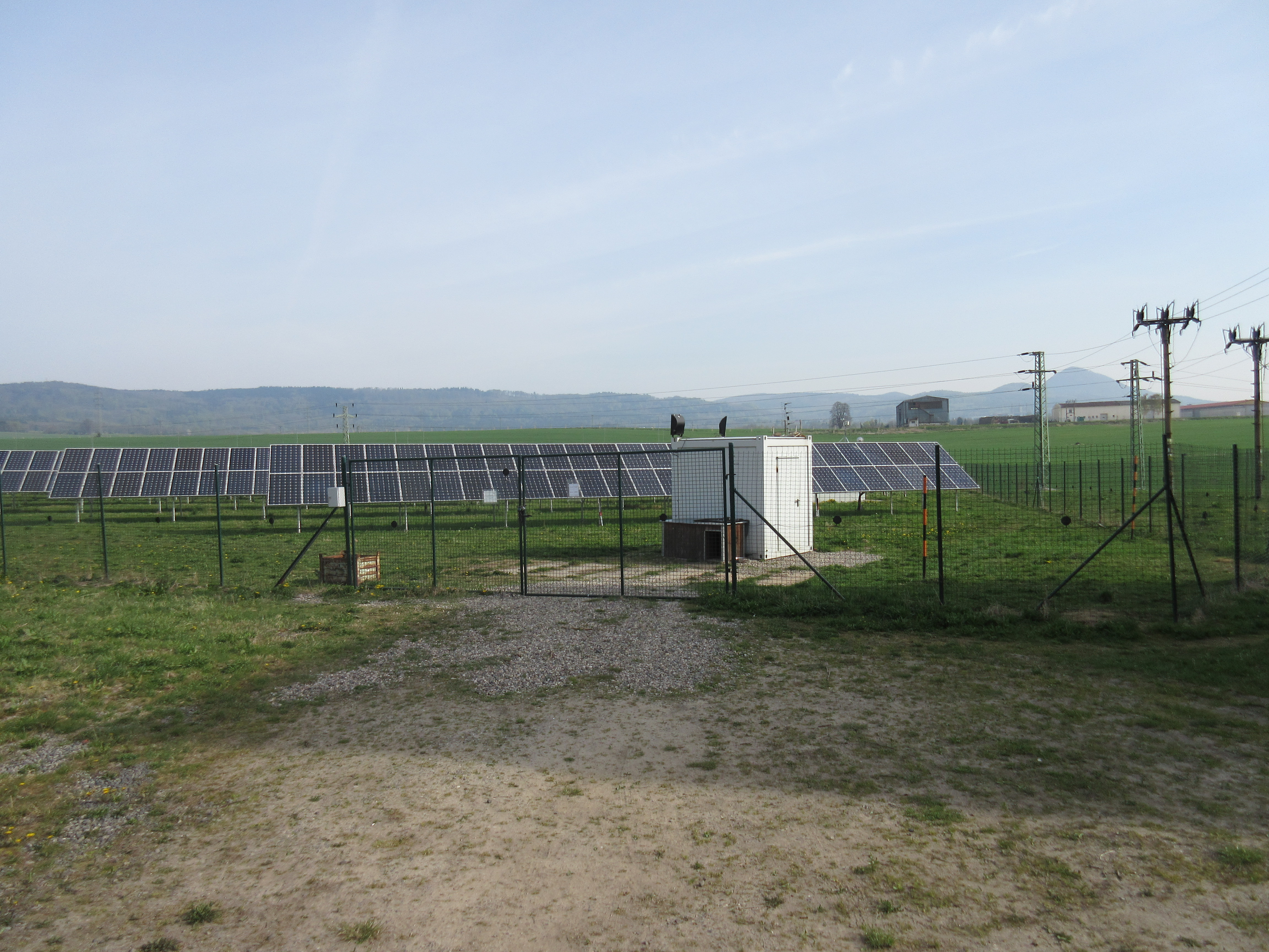 Elektrárna za obcí Skalice u České Lípy